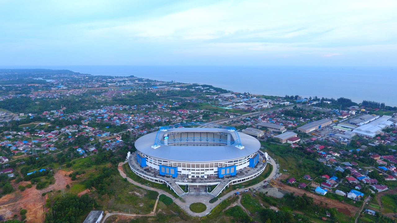 2017-11-10 Batakan BPN